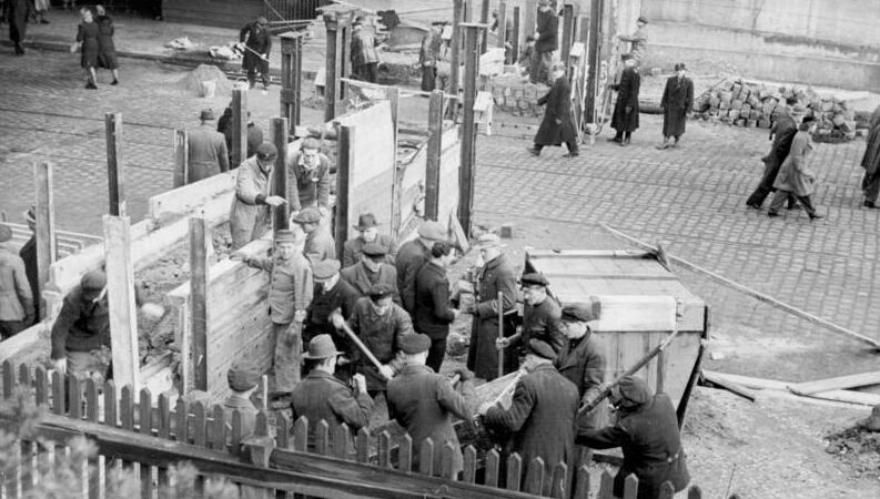 Berlin, Bau einer Panzersperre ADN-ZB/Archiv Das faschistische Deutschland im II. Weltkrieg 1939-45 Berlin wird am 1. Februar 1945 zum "Verteidigungsbereich" erklärt. Volkssturmsoldaten am 10. März beim Bau einer Panzersperre an einer Bahnunterführung. 343-45 [Scherl Bilderdienst]